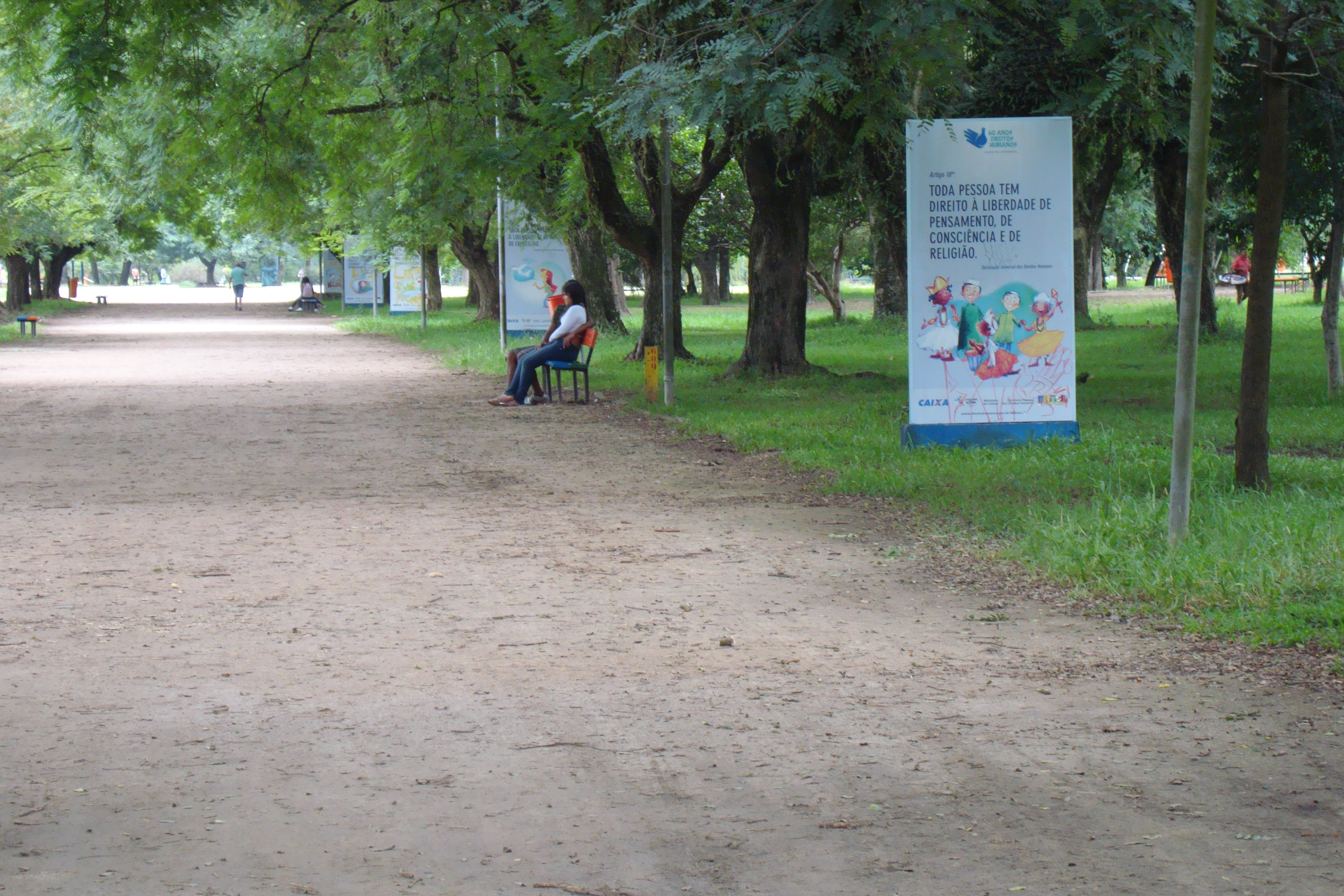 Material comemorativo dos 60 anos da Declaração dos Direitos Humanos : Art. 18. Local: Parque Marinha do Brasil